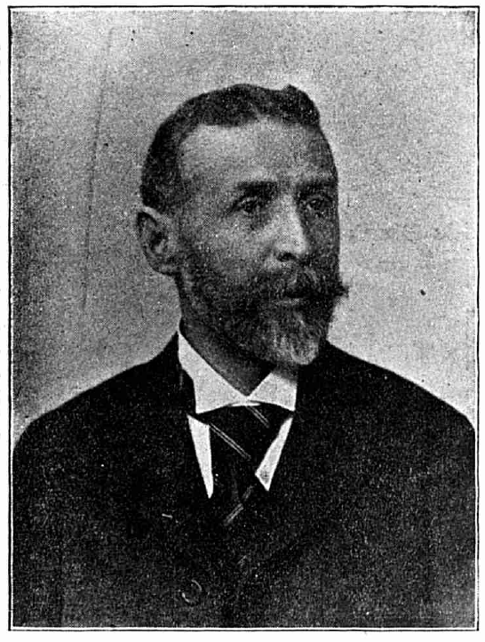 Mauriciu Blank - administrator al băncii Marmorosch-Blank (România), 1910